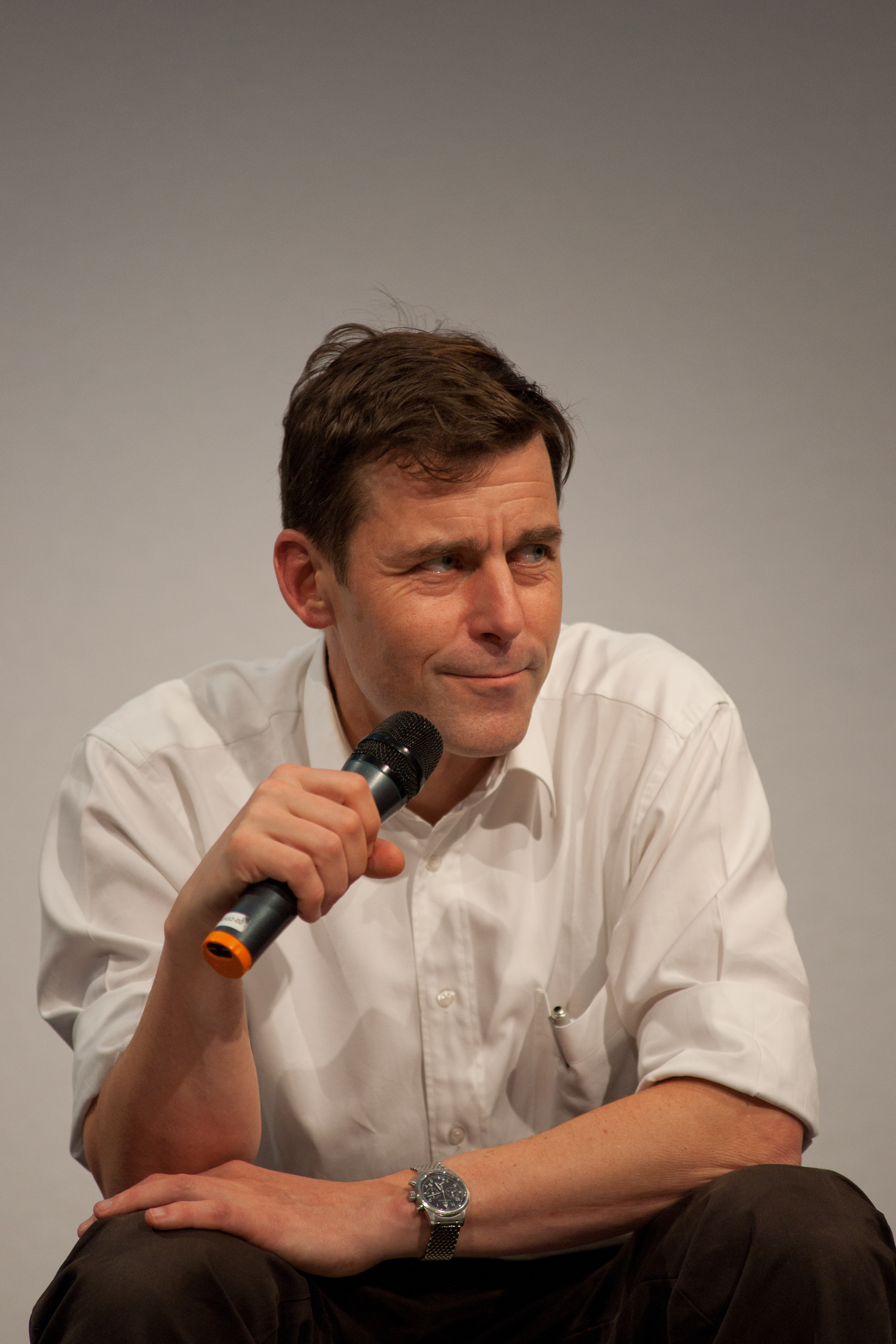 Peter Stamm, au Salon du livre de Genève, en 2012.